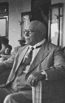 Foto. De heer en mevrouw Vattier - Kraane en gezelschap aan dek ter hoogte van Sabang